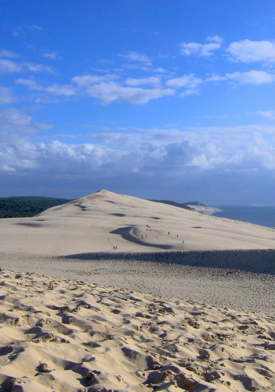 Dune du Pyla